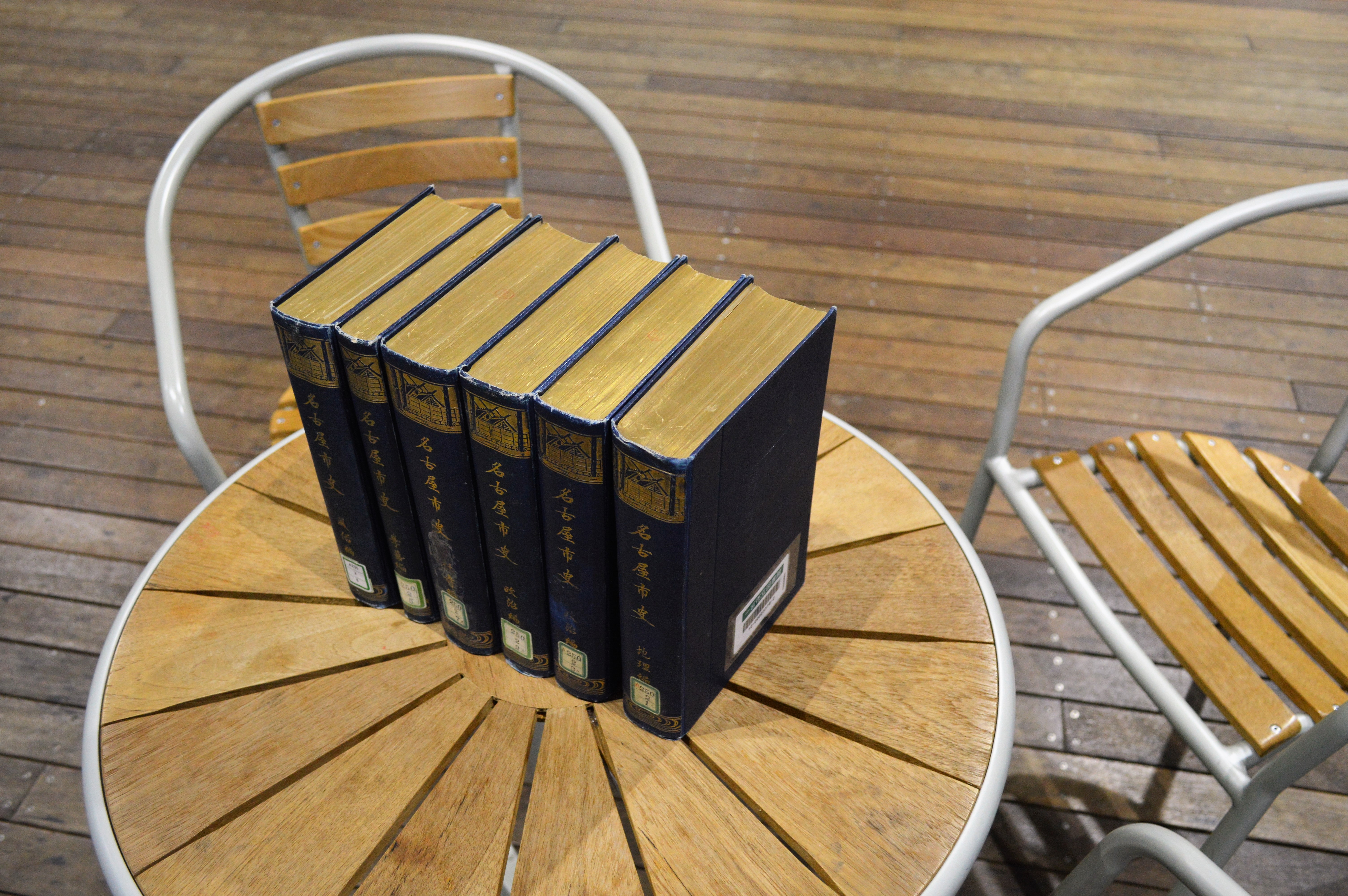 名古屋市が刊行した『名古屋市史』（1915年-1916年、もっとも古い名古屋市史）の一部。金付けが施されている。